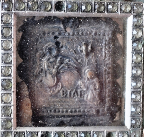 Ο Ευαγγελισμός